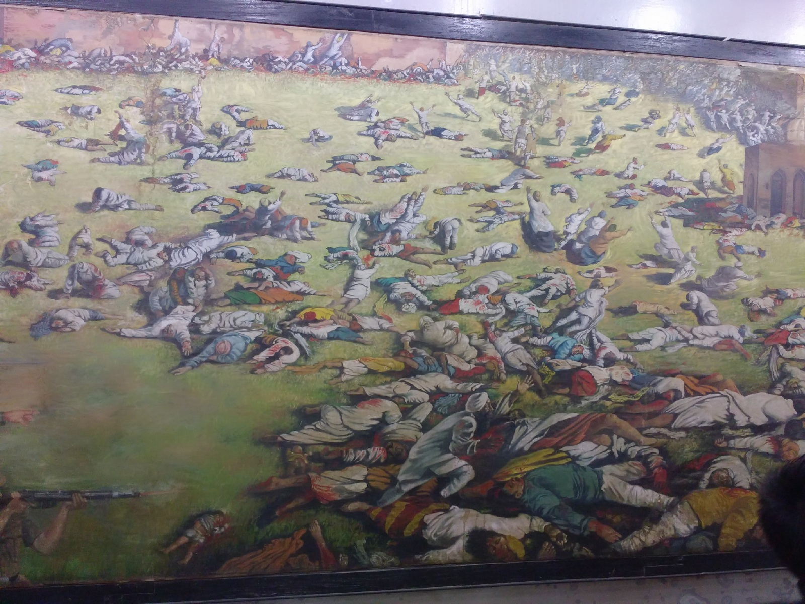 ஜாலியன் வாலா பாக் படுகொலை வரையப்பட்ட படம்